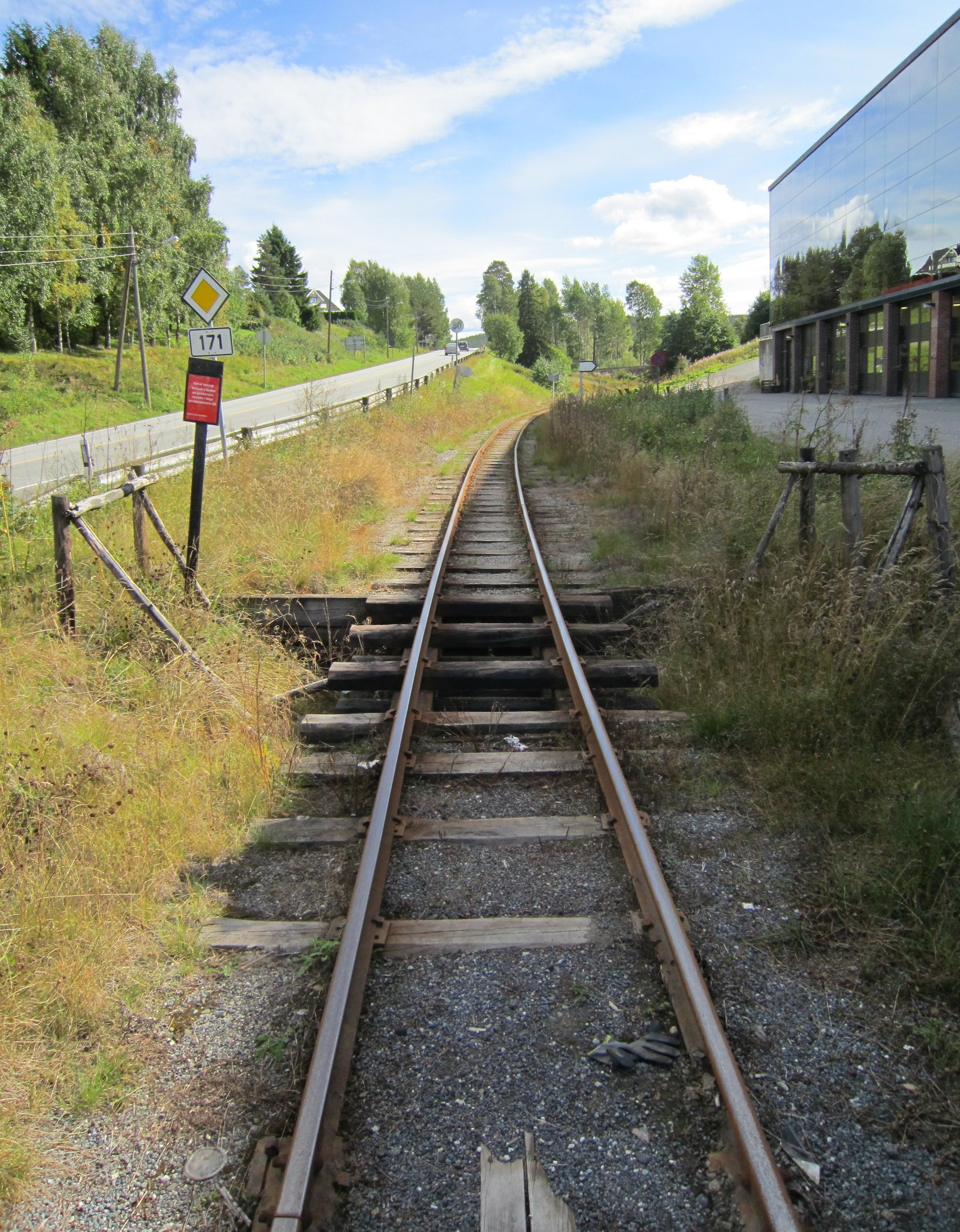 Nær Sørumsand går museumsjernbanen Tertitten parallelt med FV171.